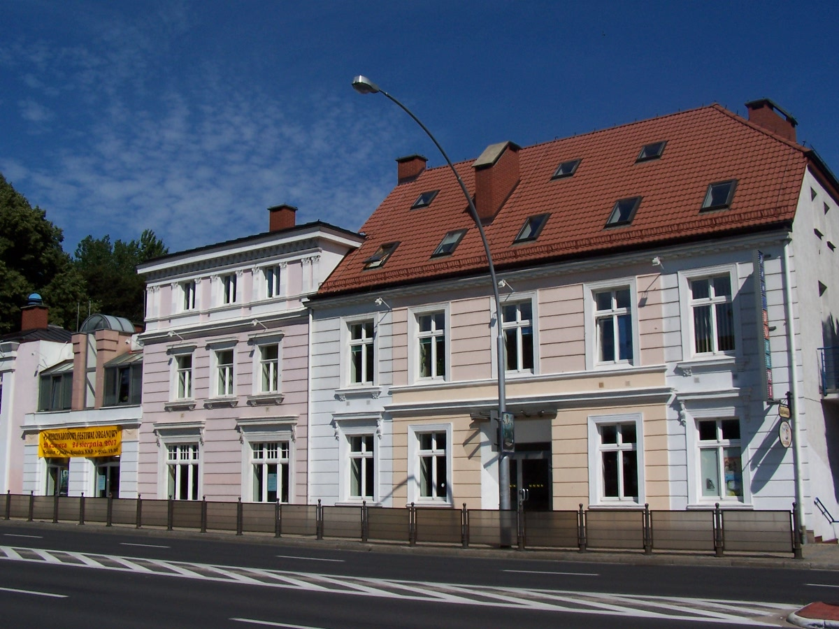 Centrum Kultury 105 w Koszalinie - front budynku